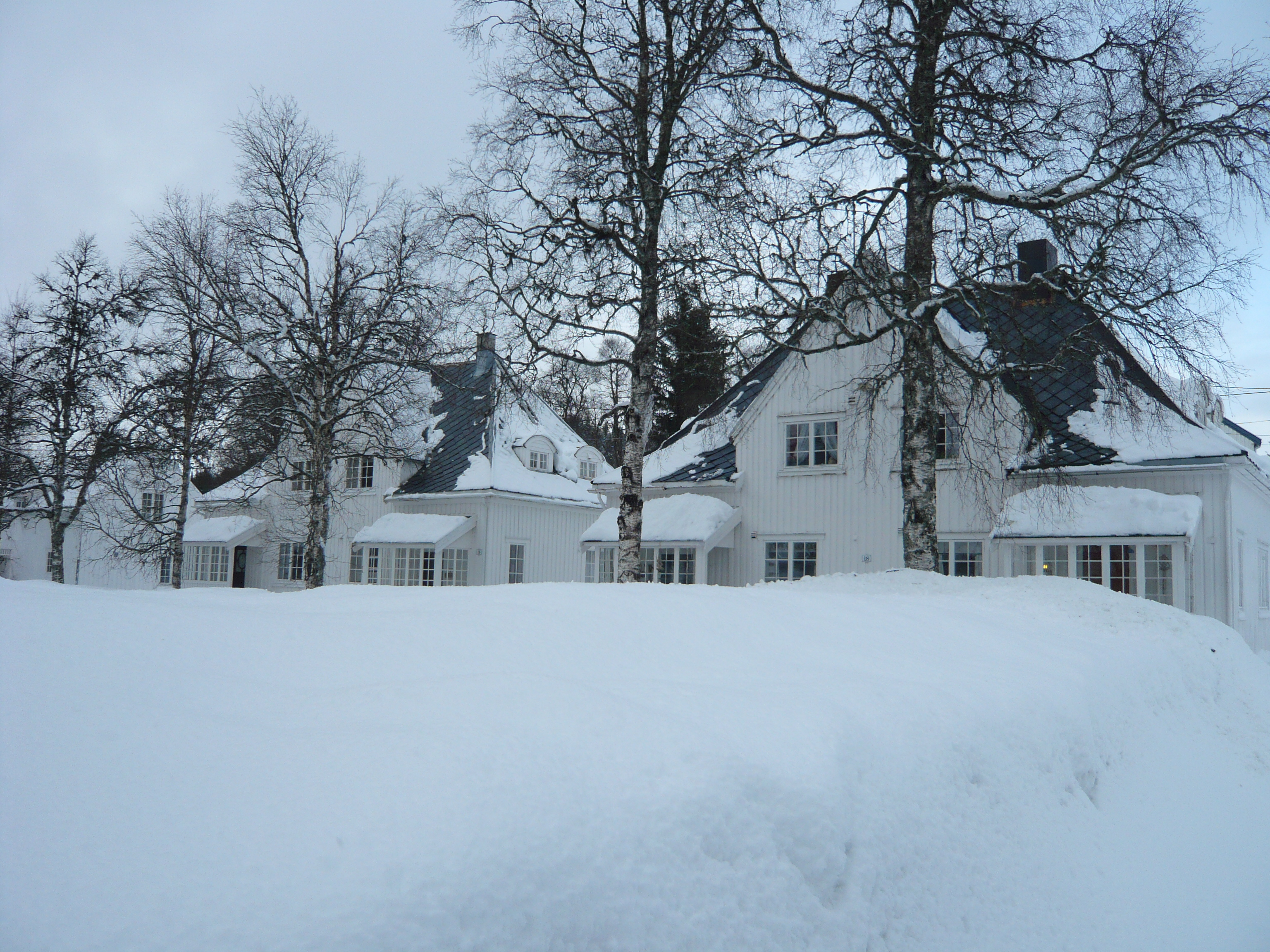 Boliger ved Torvet i Bjørnli Haveby. Disse boligene ble opprinnelig bygget for stigere og formenn.